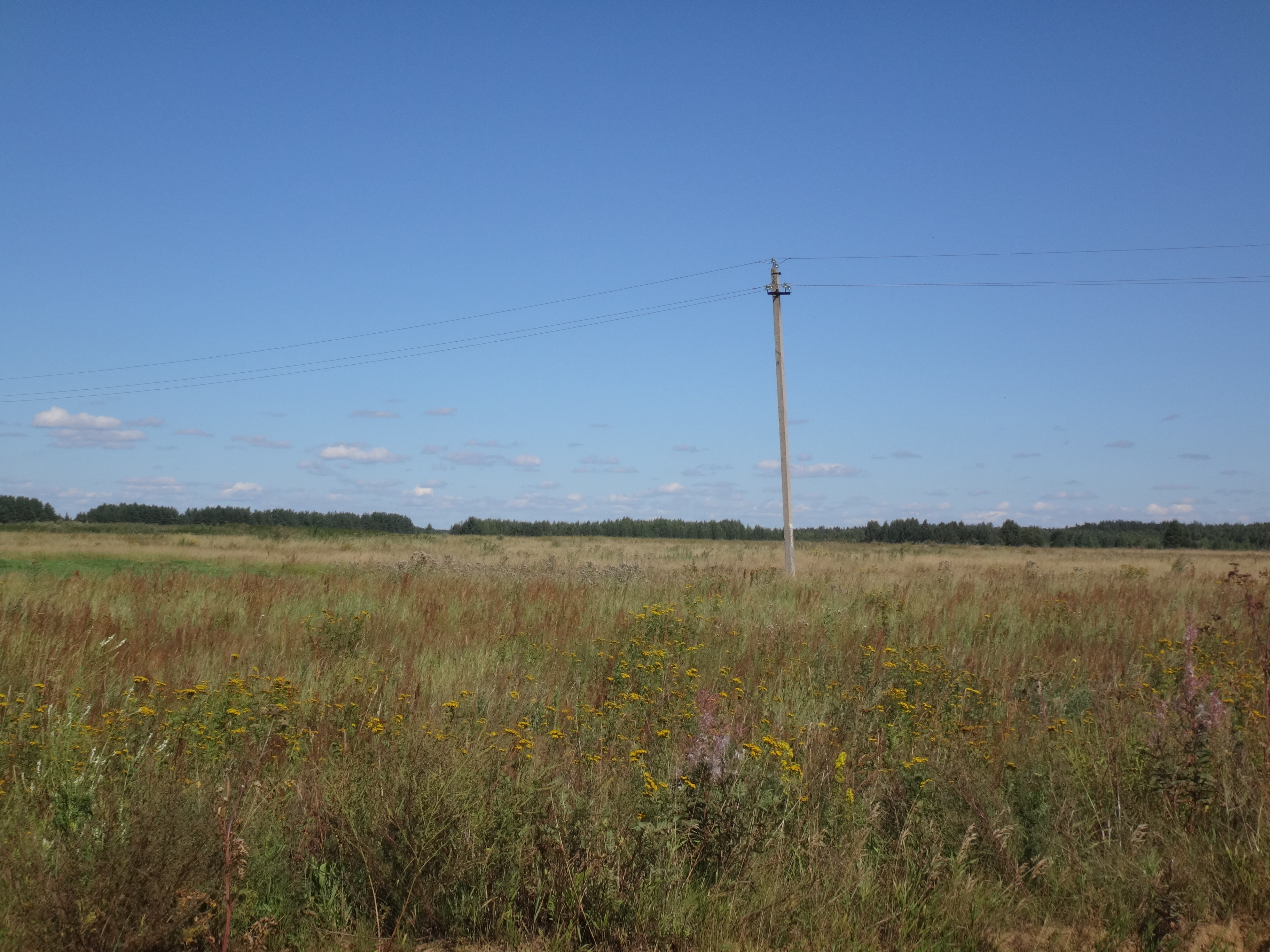 ЛЭП на 10 кВ